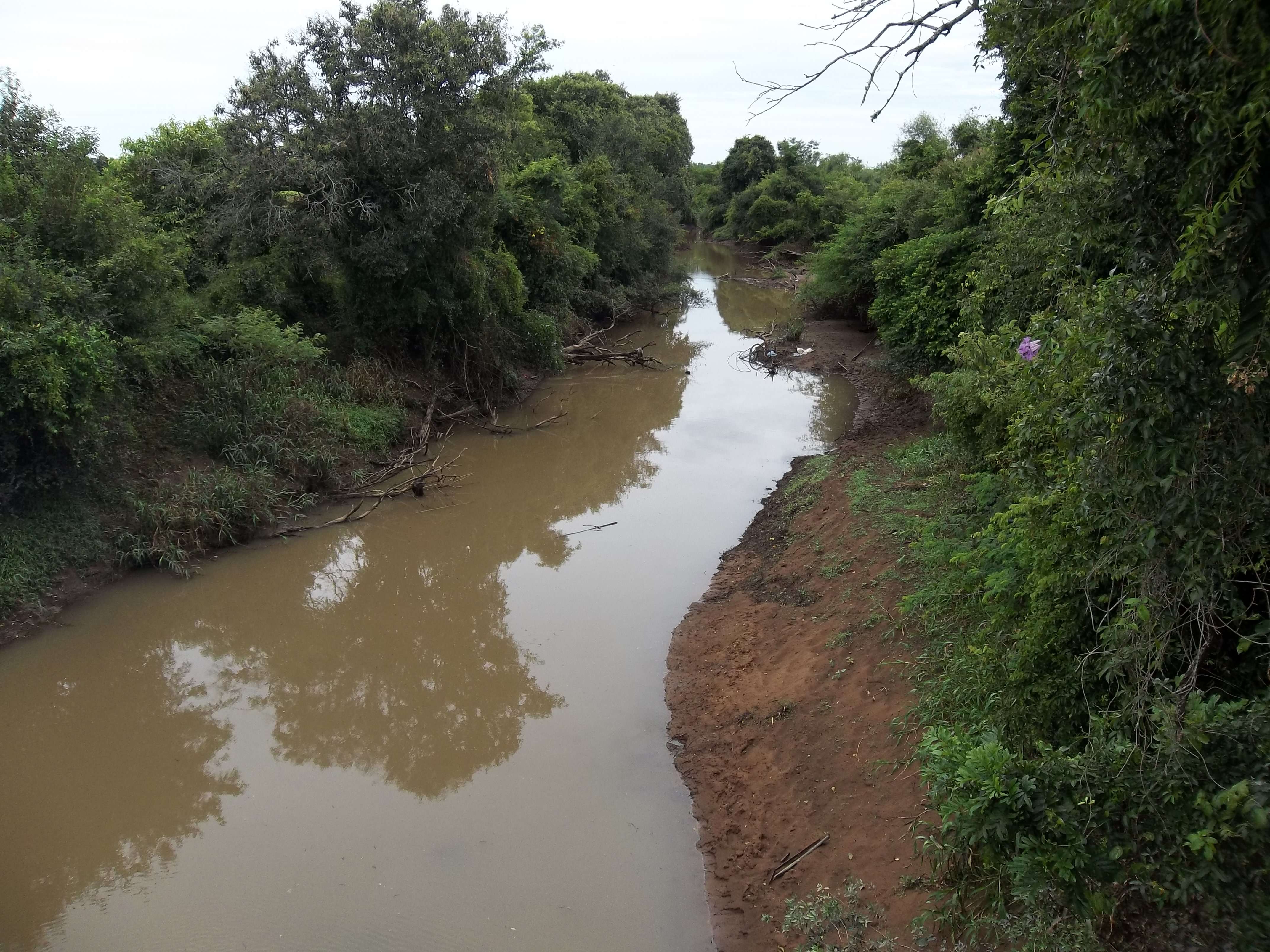 Rio Vacacaí-Mirim. Pains, Santa Maria, Santa Maria, Rio Grande do Sul, Brasil